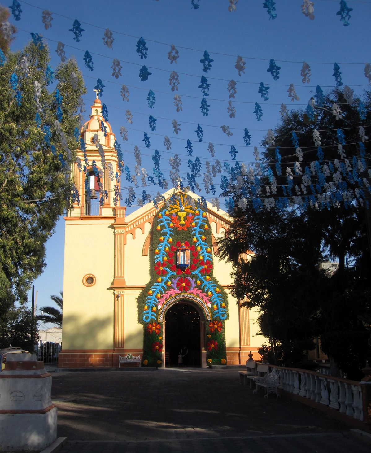 Templo de la Inmaculada Concepción i San Salvador de Atenco i Atenco kommune i Mexico